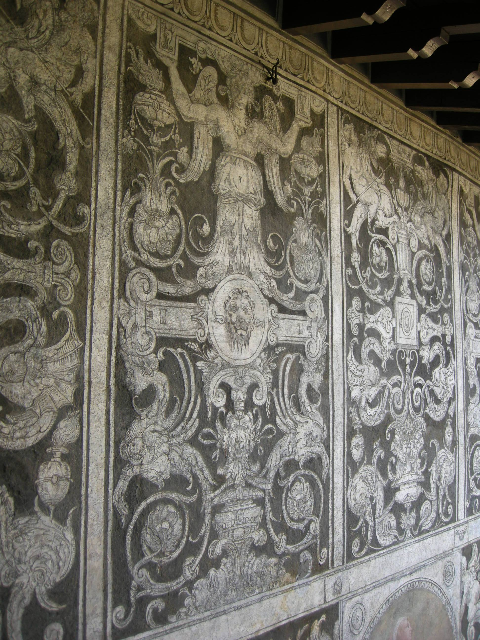 Palazzo de' pepi, cortile, graffiti